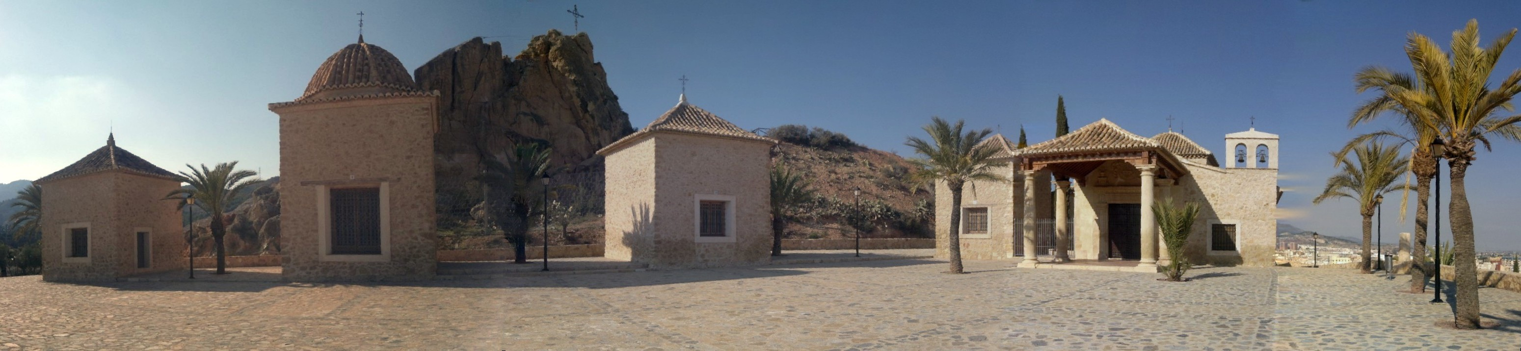 Vista panorámica del monte Calvario